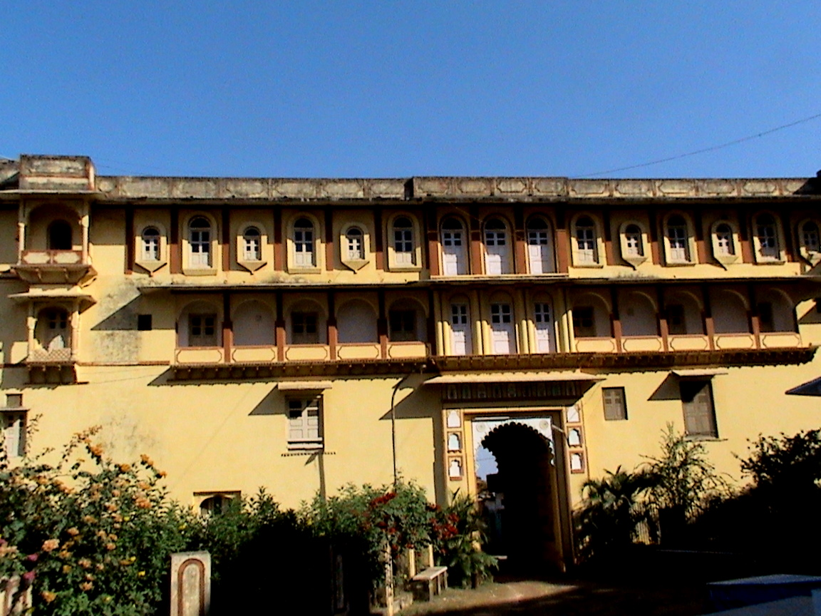 देवगढ़ में पुराना राजमहल Pratapgarh Old Palace